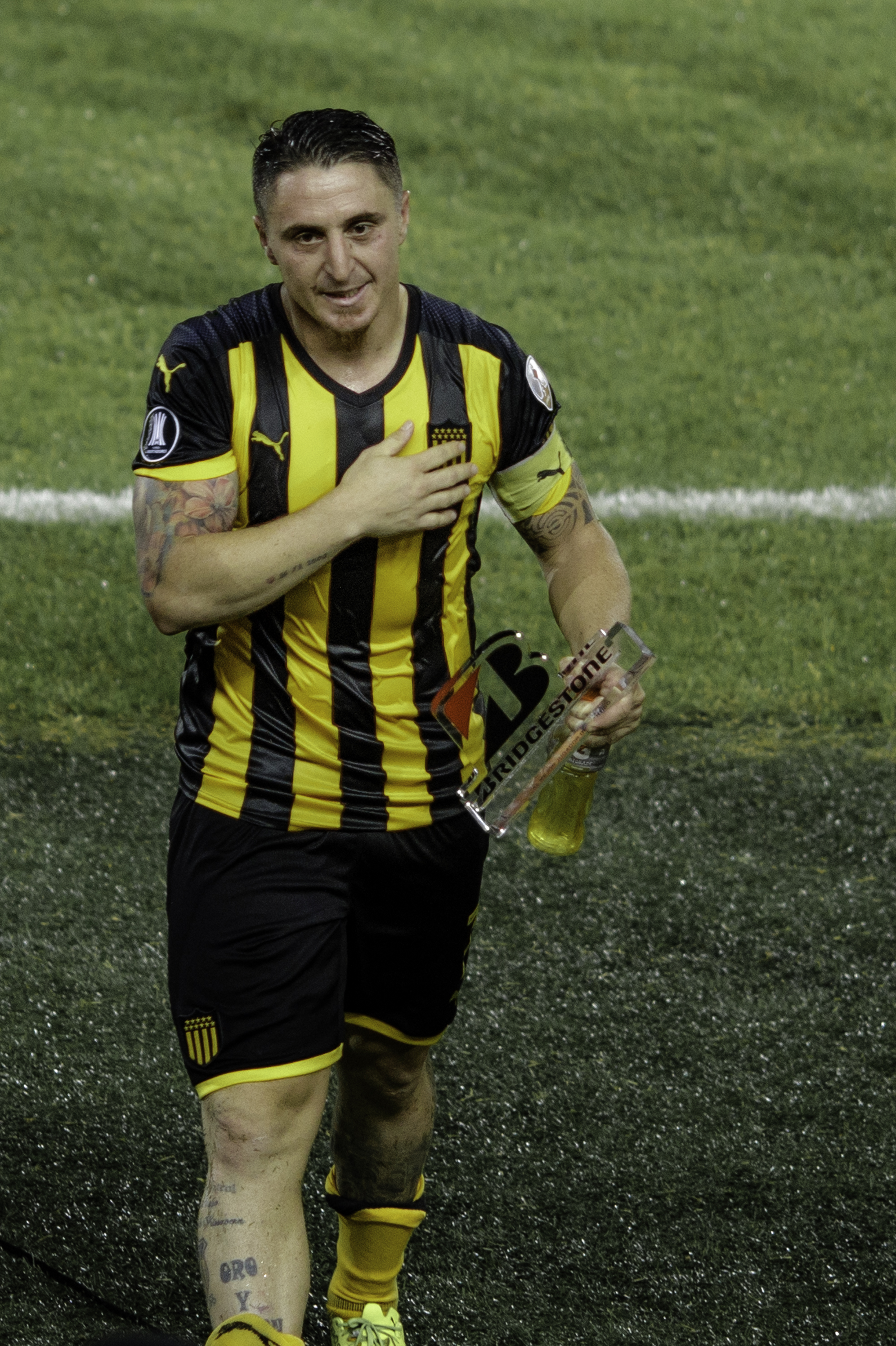 Campeón del Siglo - Copa Libertadores Peñarol 3 - Atlético Tucumán 1 Camera: Canon EOS 5D Mark IV 0 ISO: 800